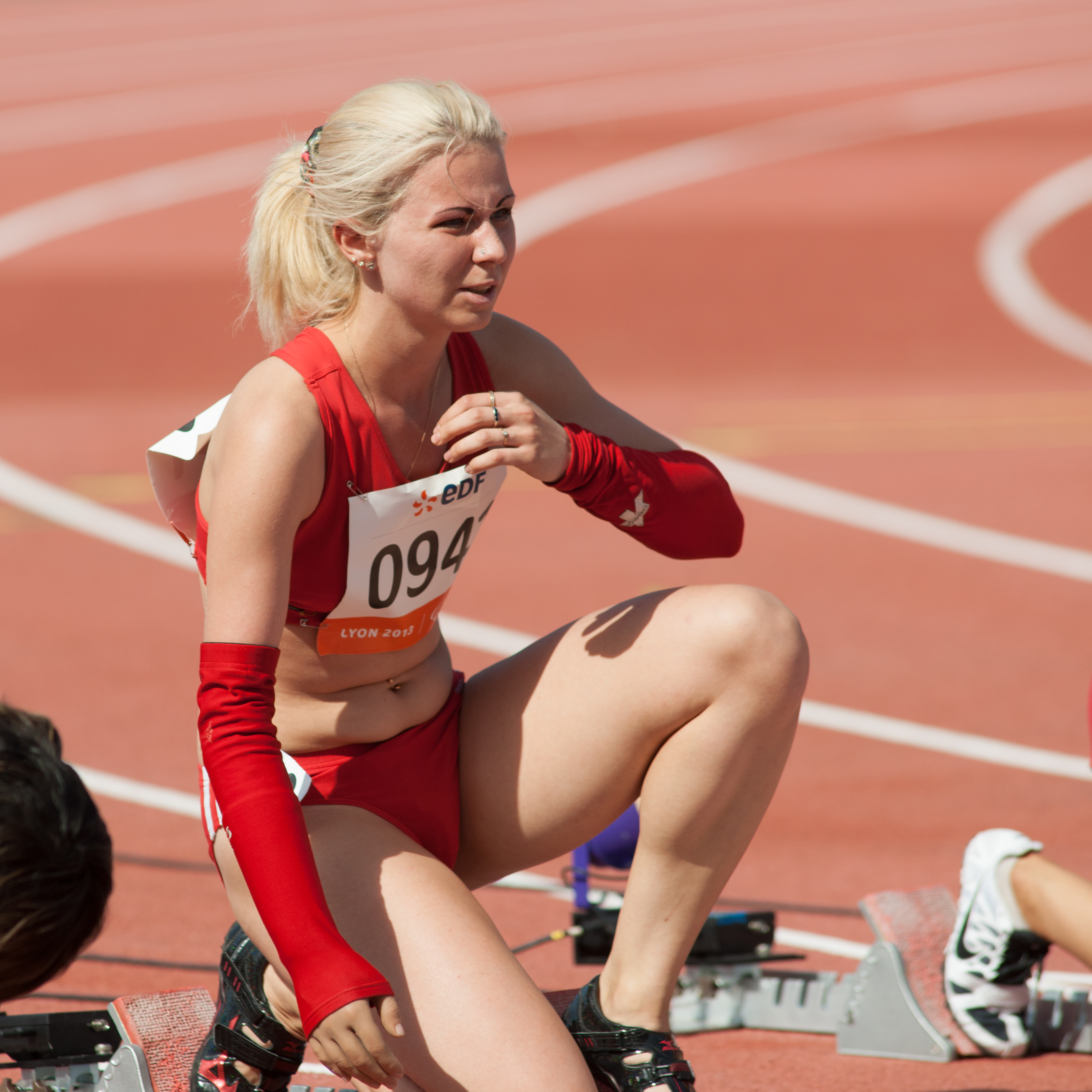 100 mètres femmes T46.